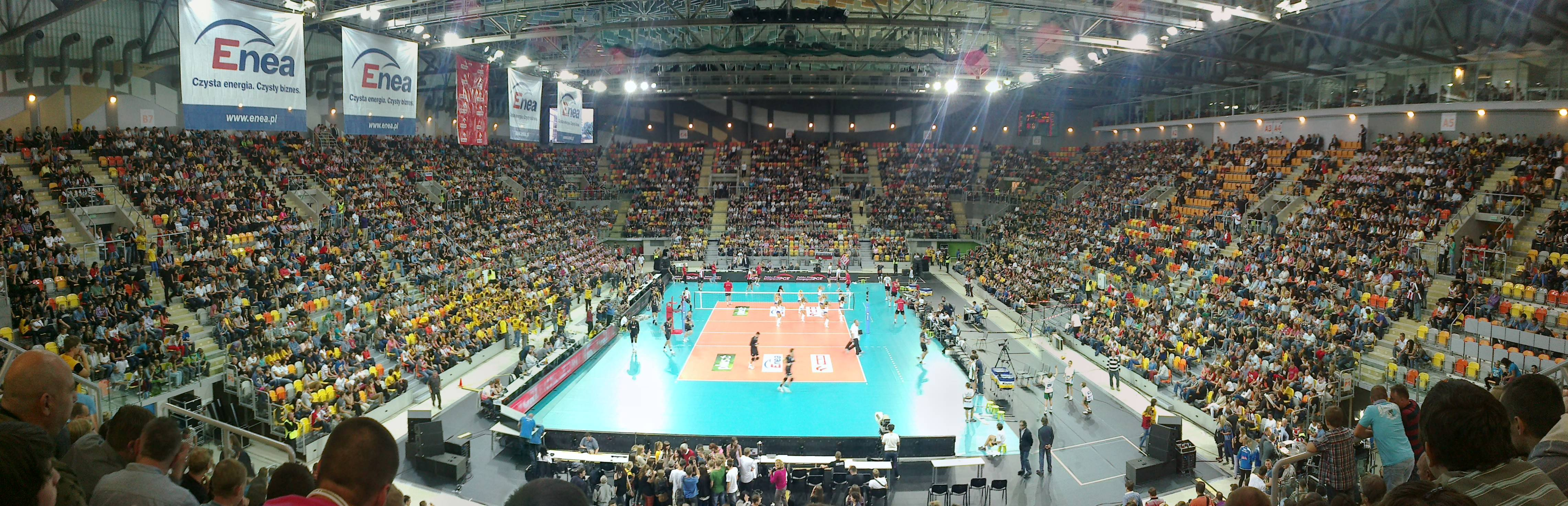 Hala sportowo-widowiskowa Częstochowa